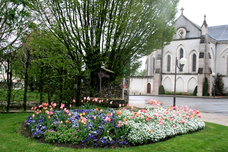 Français